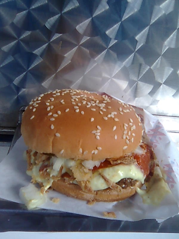 Dansk bøfsandwich med det hele, København